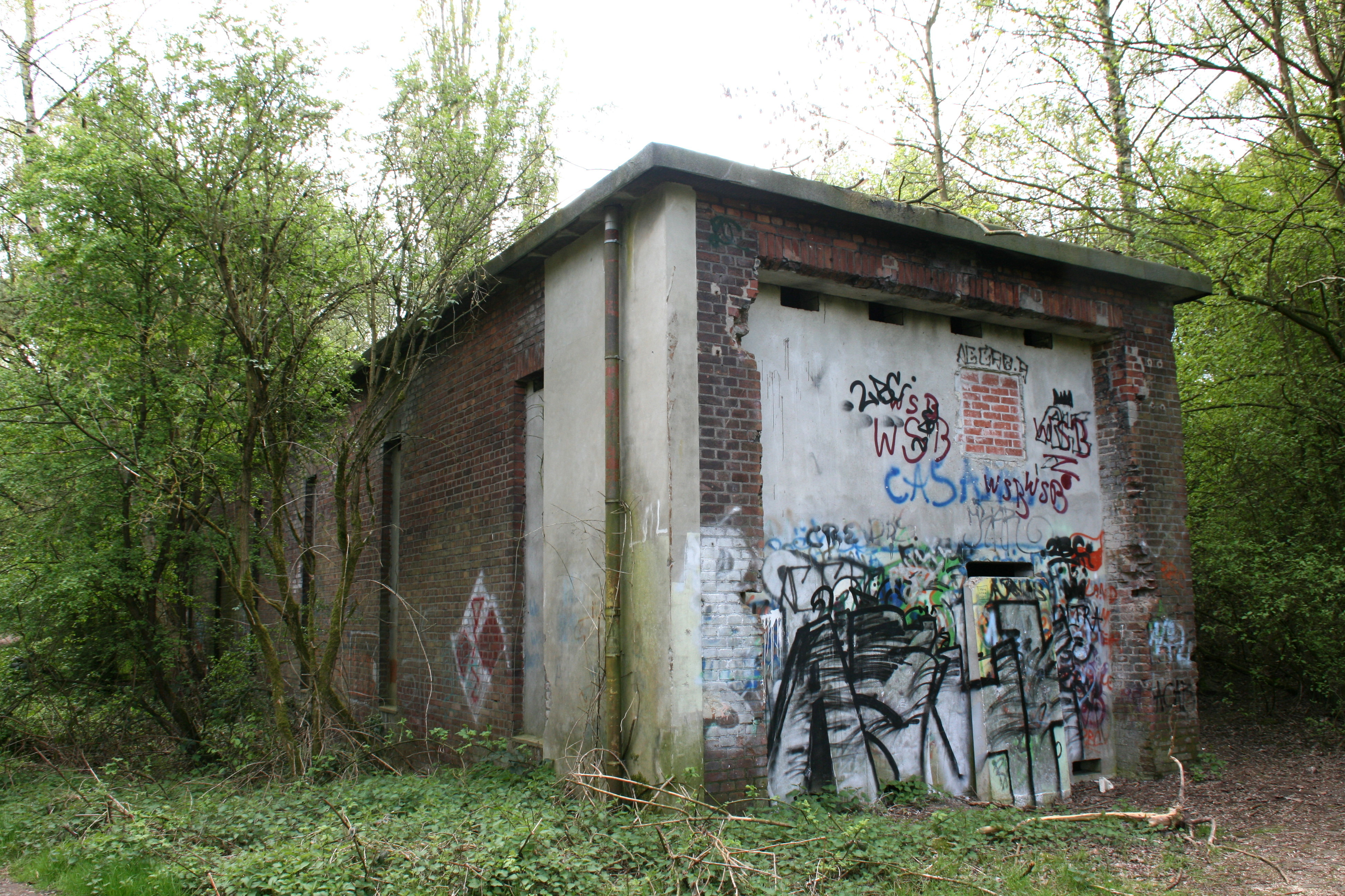 Königsgruber Park, Königsgruber Straße in Herne Ehemaliger Lokschuppen der Zeche Königsgrube, heute Rückzugs- und Brutbereich für Fledermäuse